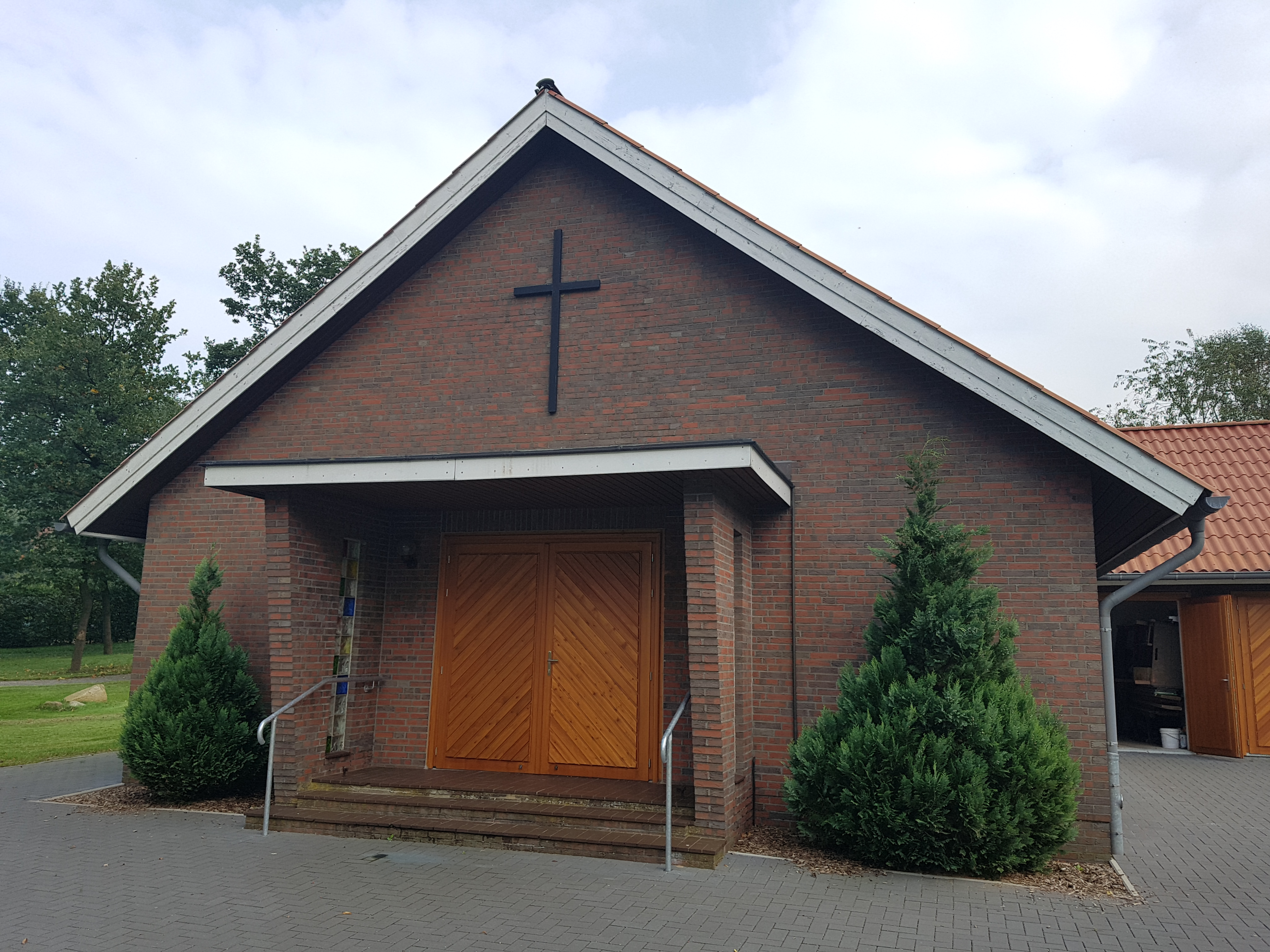 Kapell an’n Karkhoff in Hollen